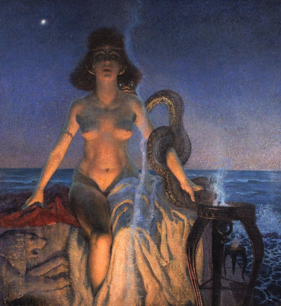 Salammbô par Glauco Cambon, 1906. Collection privée.